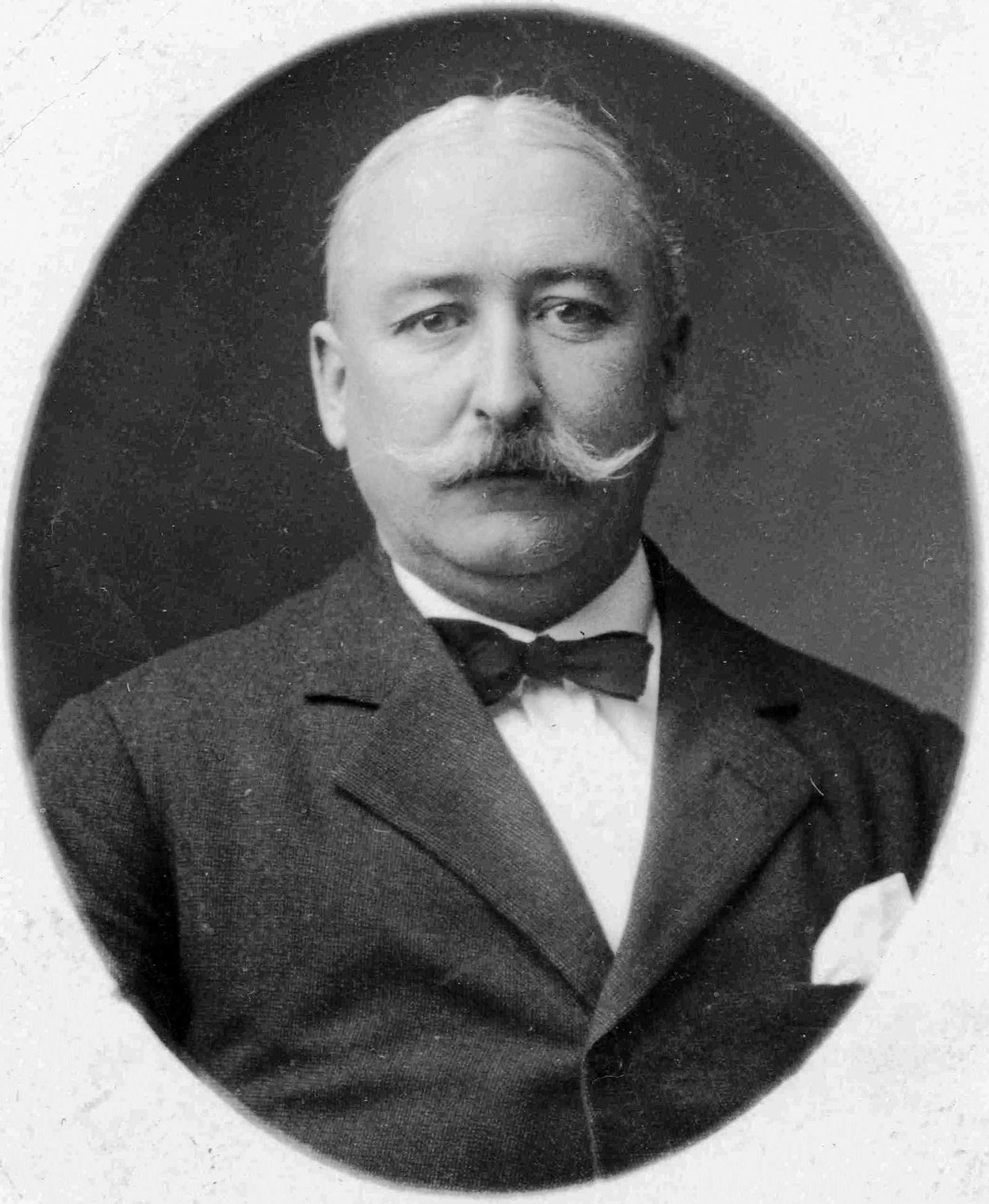 Ubaldo Gil Santóstegui